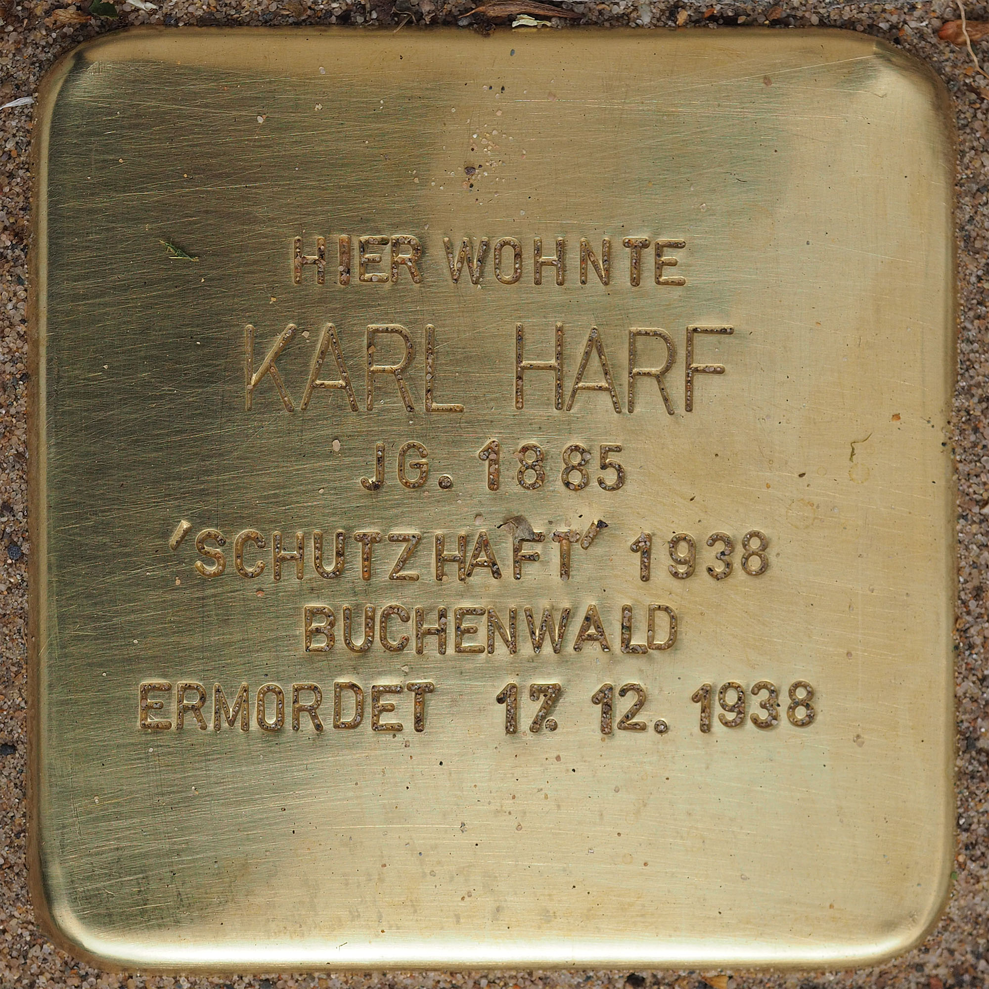 Stolpersteine Suechteln: Harf, Karl